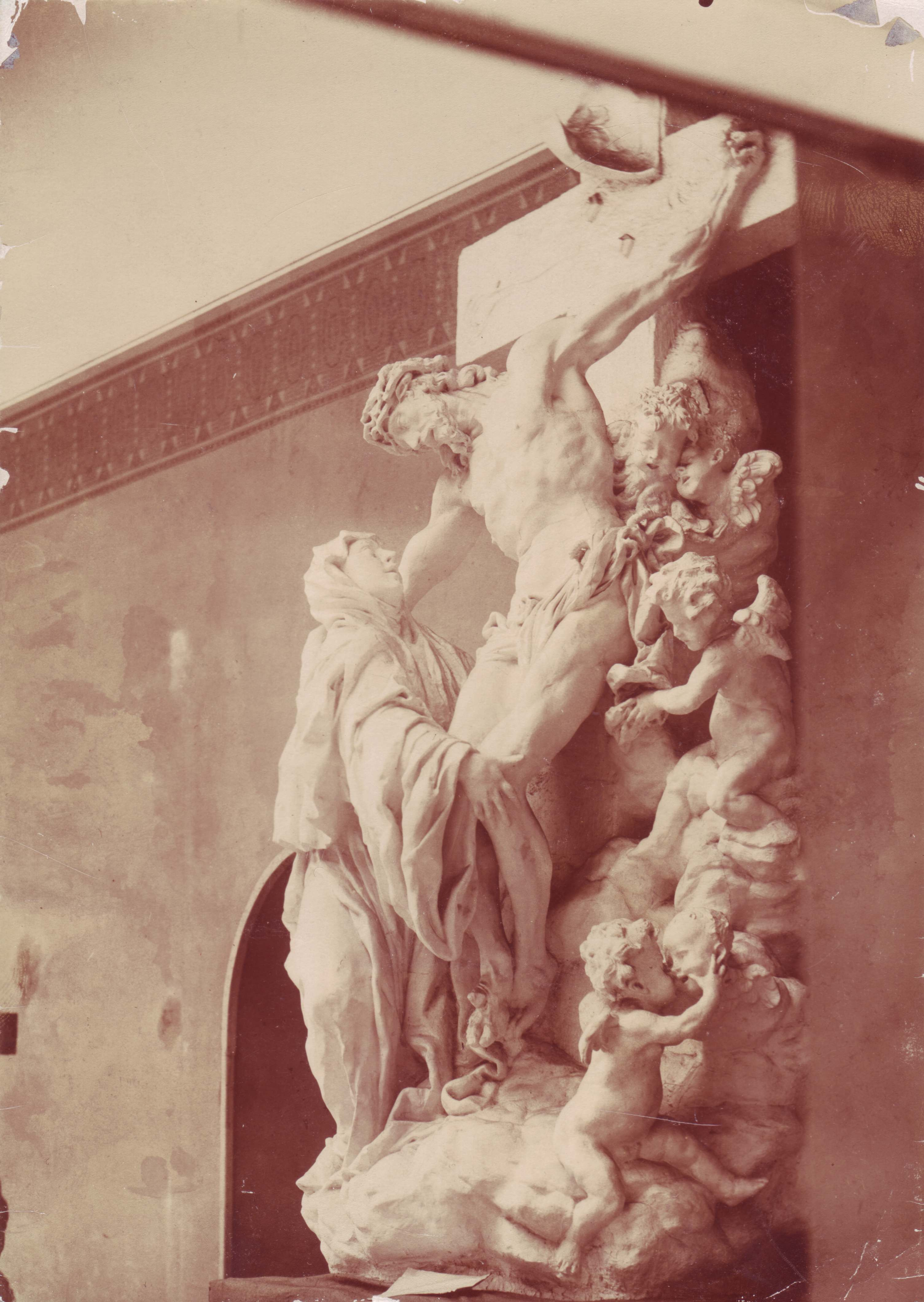 Sen sv. Luitgardy, dílo Matyáše Bernarda Brauna v kopii Bohumila Vlčka.